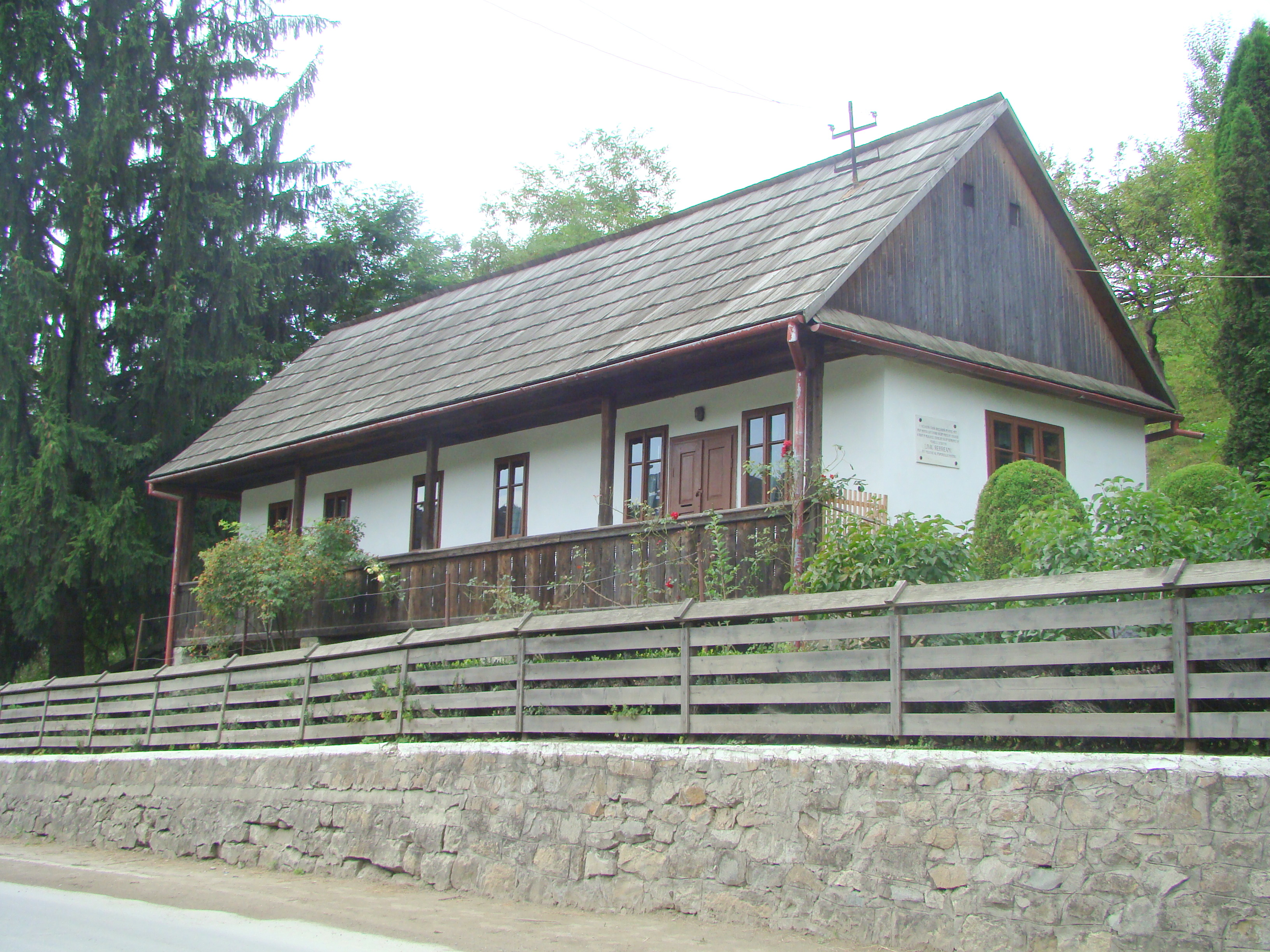 Muzeul memorial „Liviu Rebreanu”, localitate componentă Liviu Rebreanu; oraș Năsăud